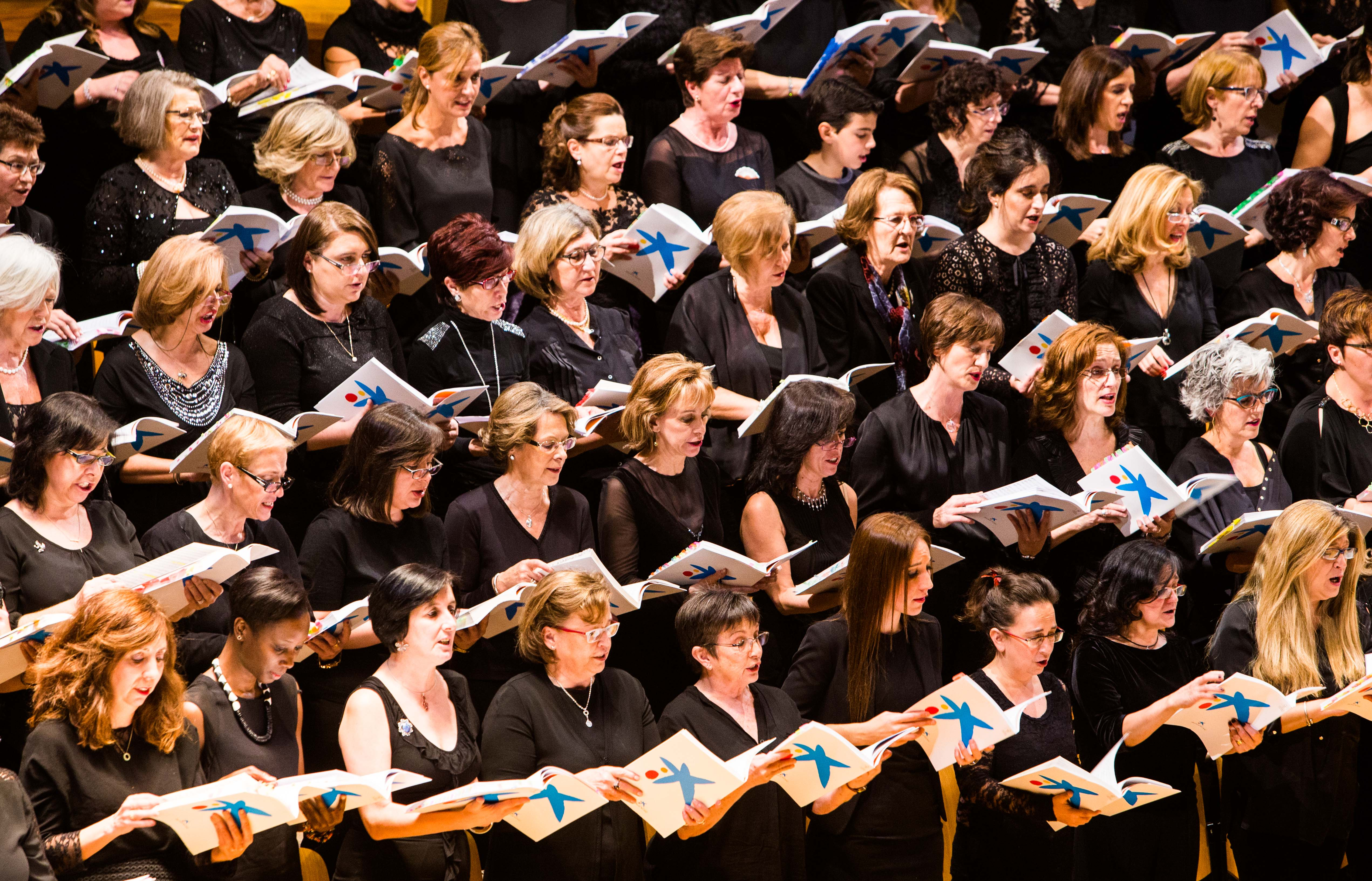 Participantes en uno de los conciertos